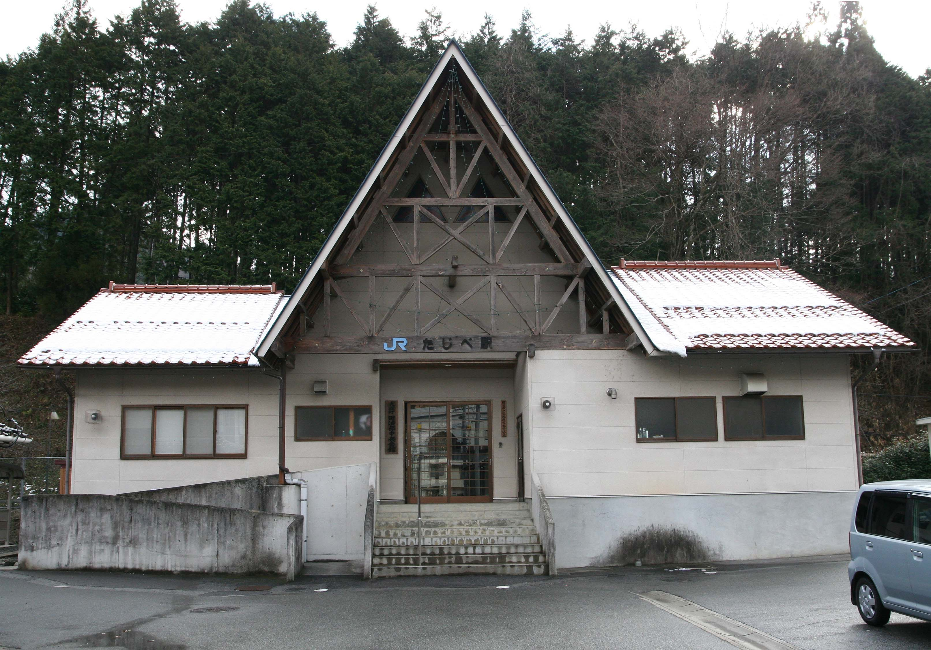 丹治部駅の駅舎